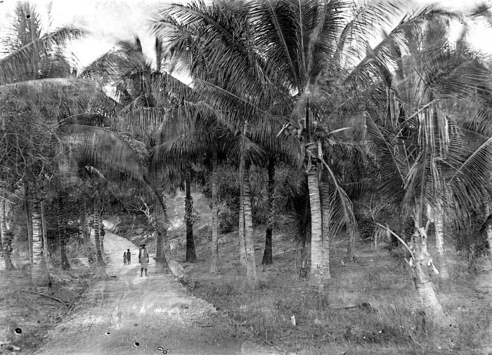 Negatief. Weg door een kokospalmbos bij Bebalain, Roti eilanden